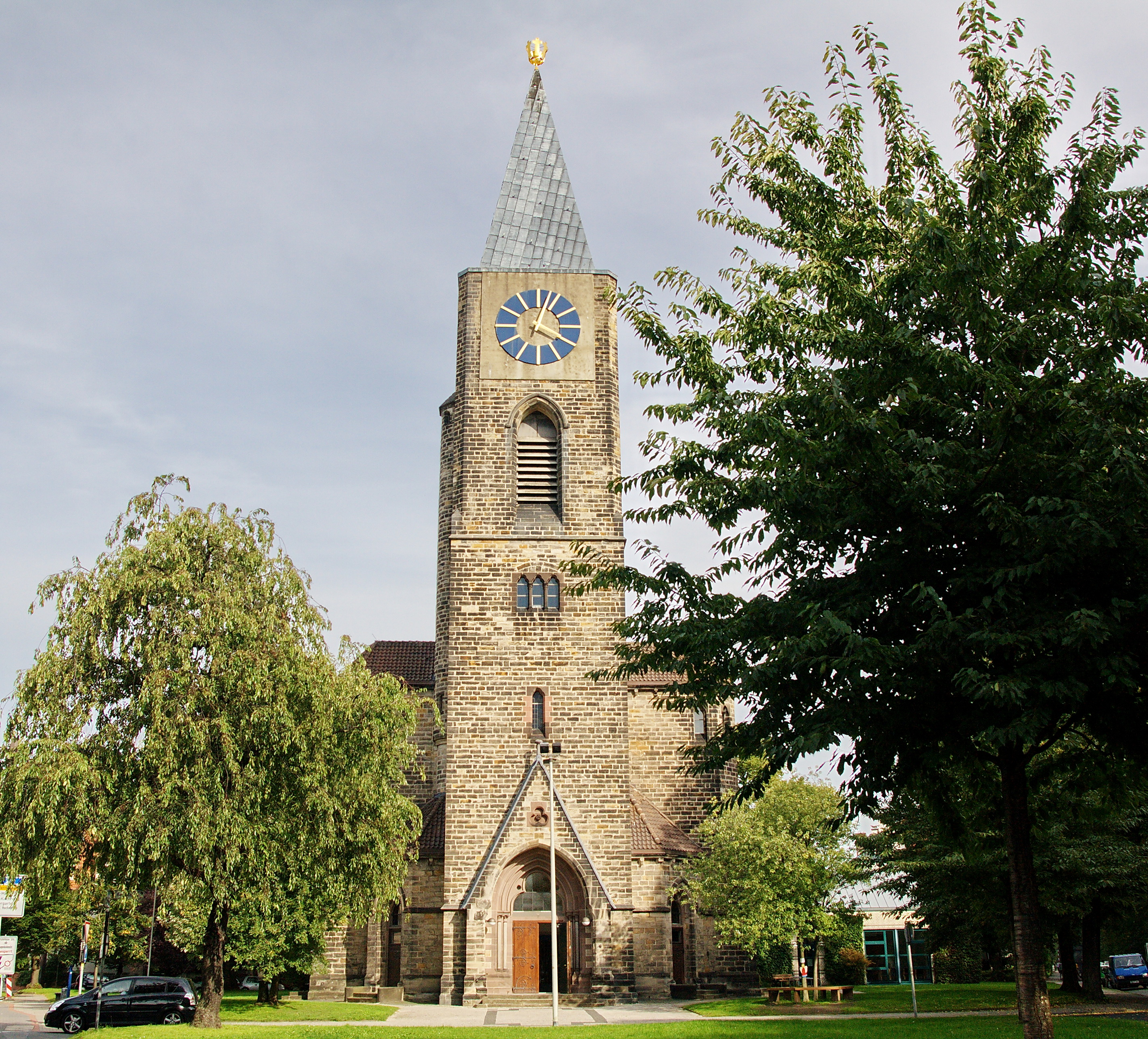 Petrikirche in Kleefeld (Hannover), Niedersachsen, Deutschland